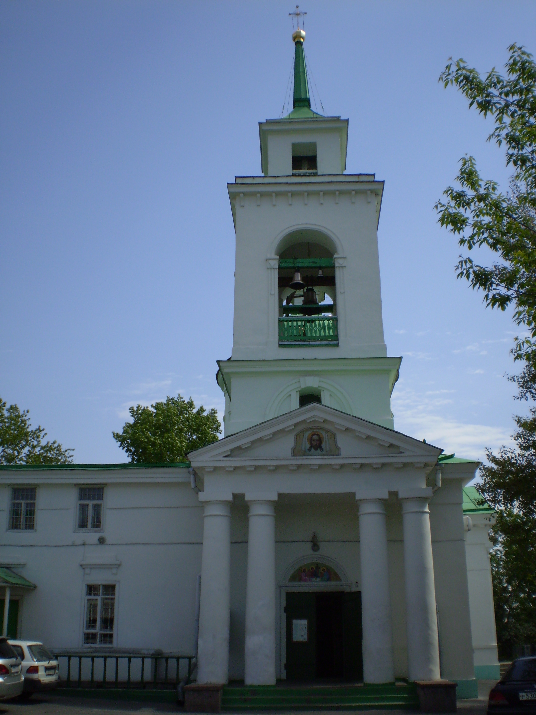 Свято-Троицкий собор